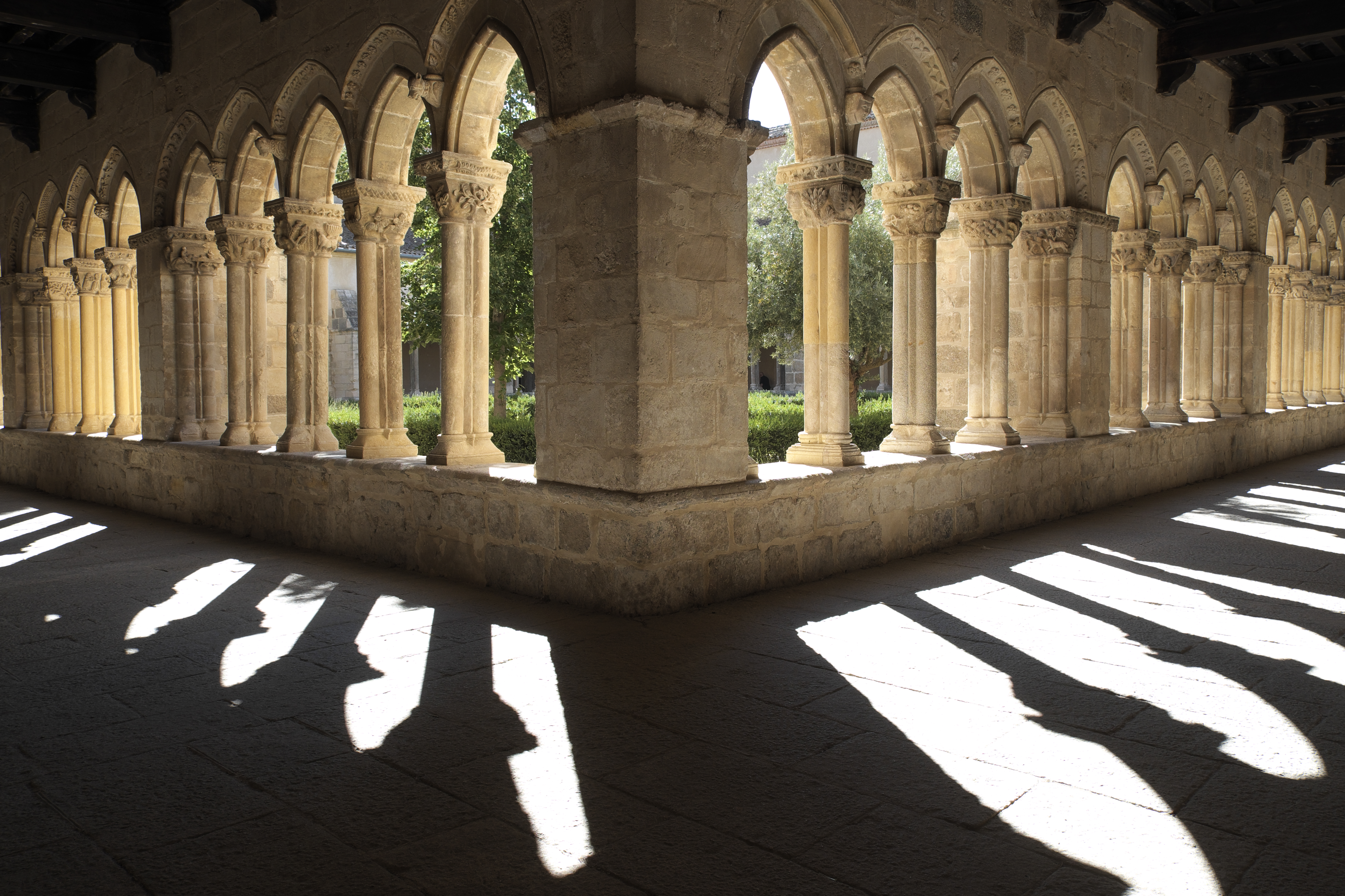 Kreuzgang des ehemaligen Dominikanerklosters in Santa María la Real de Nieva in der Provinz Segovia (Kastilien-León/Spanien), Galerien